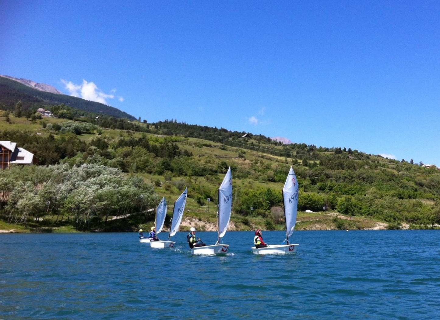 Activités nautiques à Chadenas